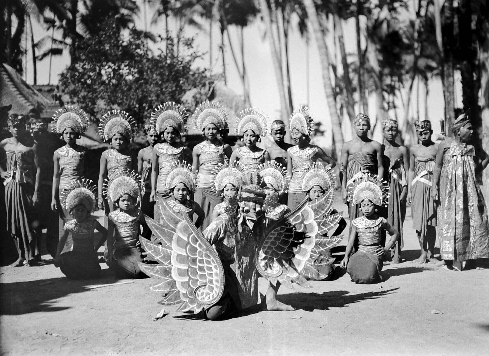 Negatief. Groep Balinese danseressen met op de voorgrond een man verkleed als de legendarische vogel Garoeda